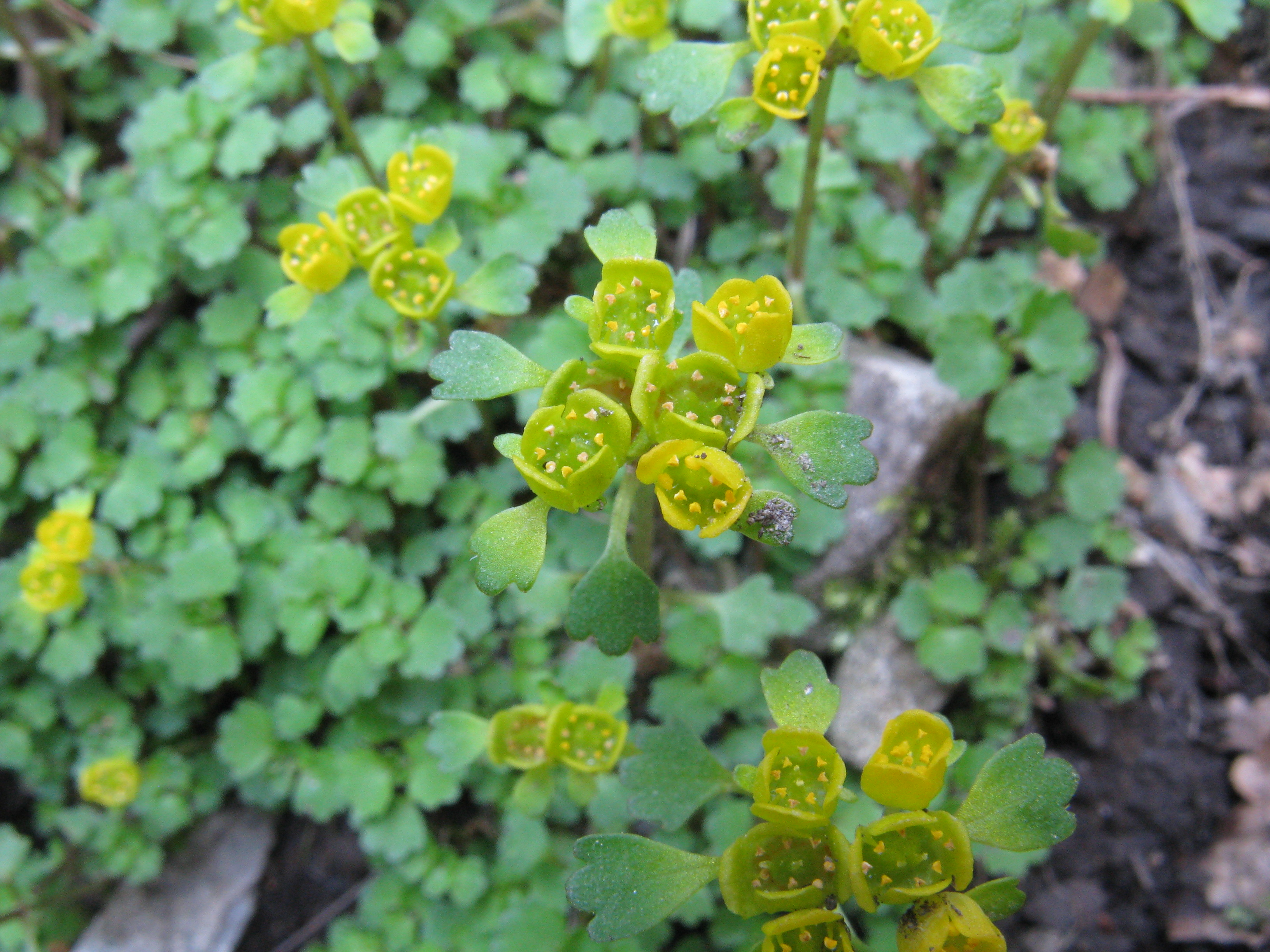 Scientific name Chrysosplenium pilosum var. sphaerospermum